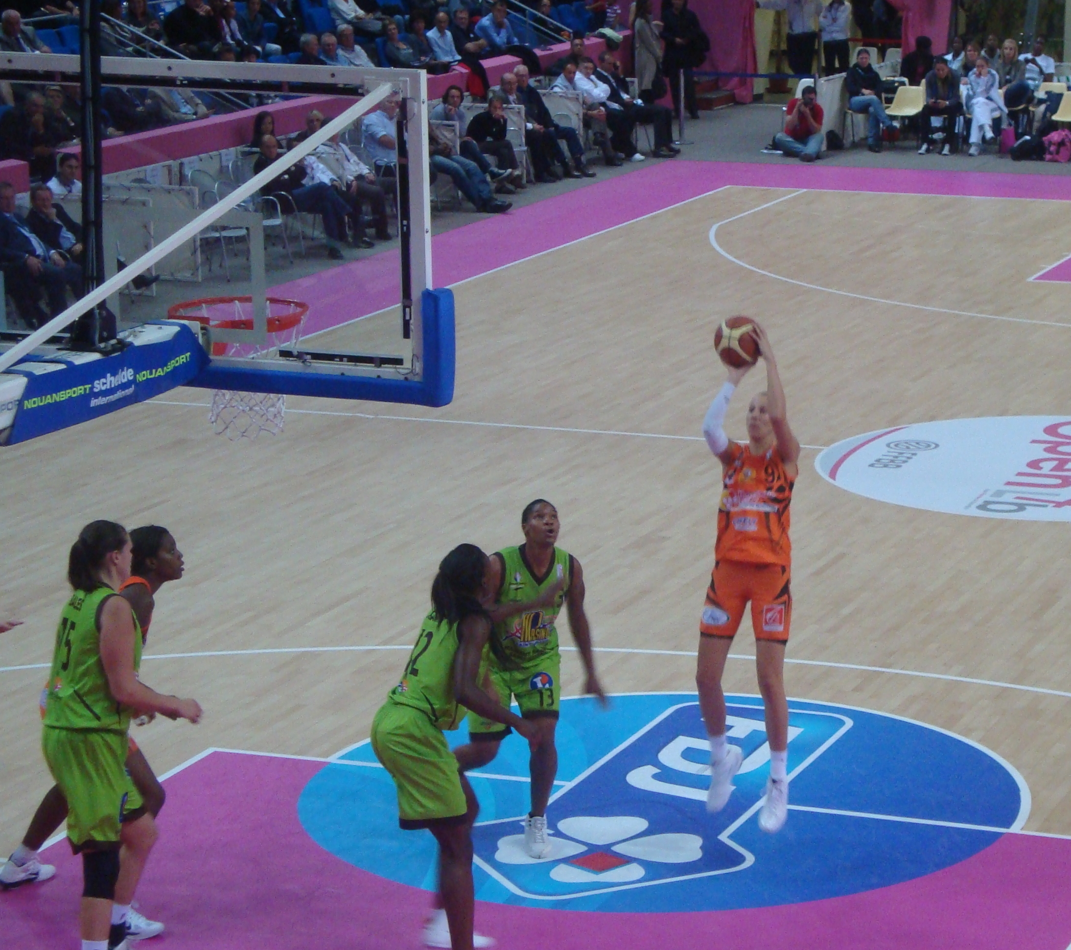 Stylianí Kaltsídou (au tir) sous le maillot de Bourges à l'Open LFB